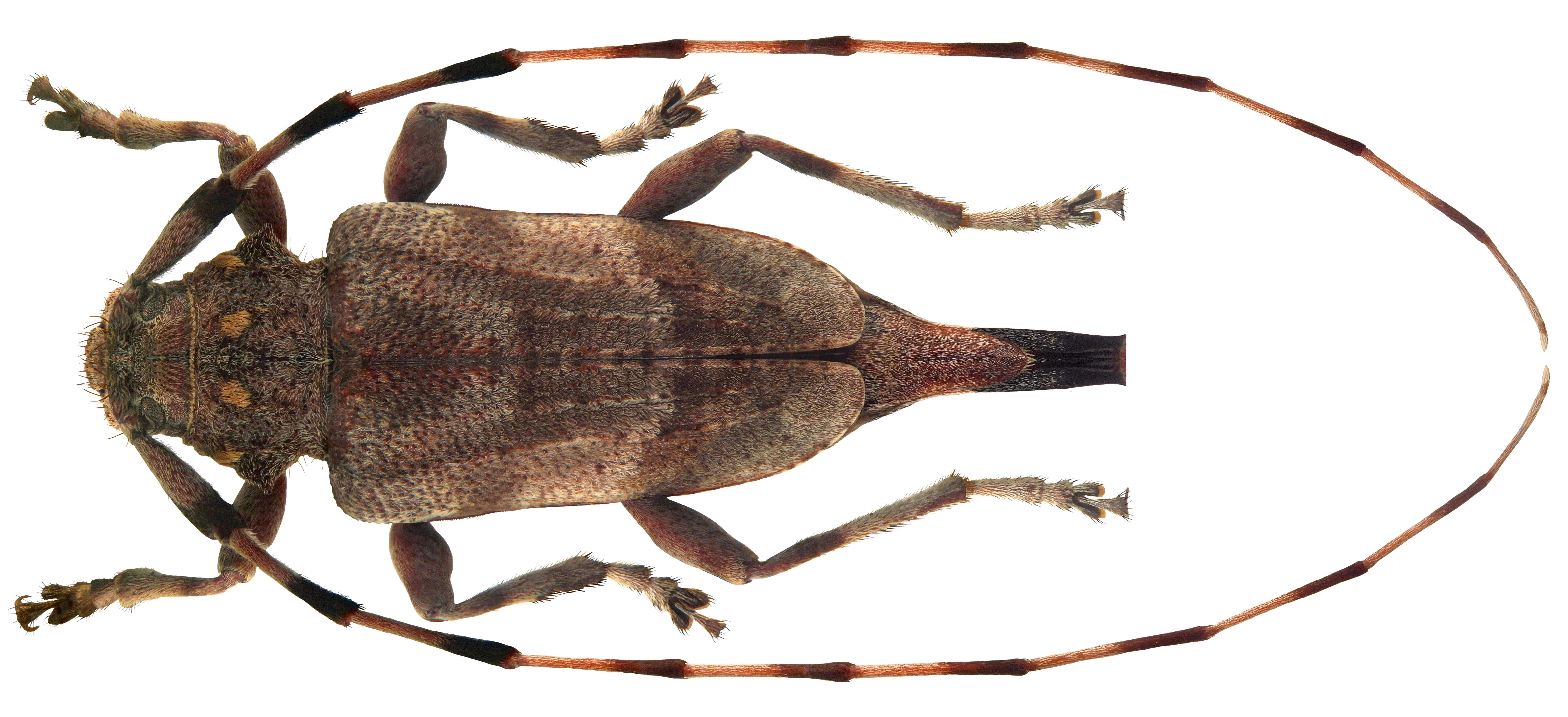 Familie: Cerambycidae Groesse: 12-20 mm Verbreitung: Europa Oekologie: Entwicklung in Kiefernholz Fundort: Germania, Bayern, Oberfranken, Kulmbach leg.det. U.Schmidt, 1977 Photo: U.Schmidt, 2010